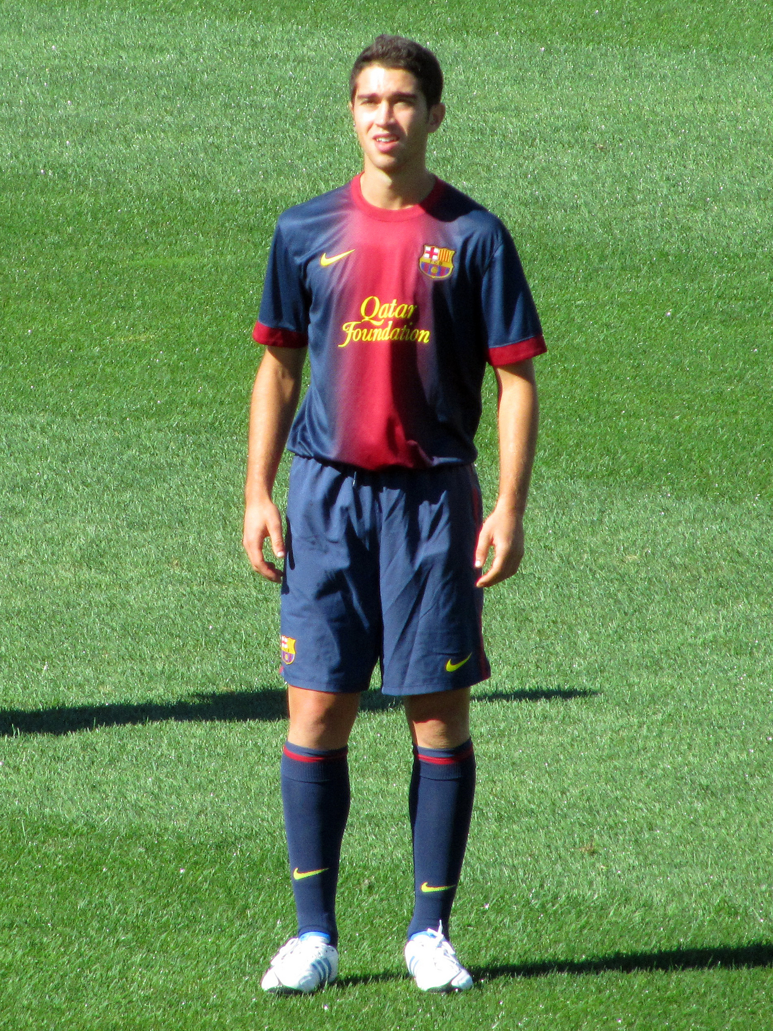 Foto realizada por Javier Segura (@castroquini)